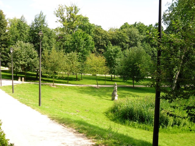 Le parc de la Martinière à Bièvres (91)